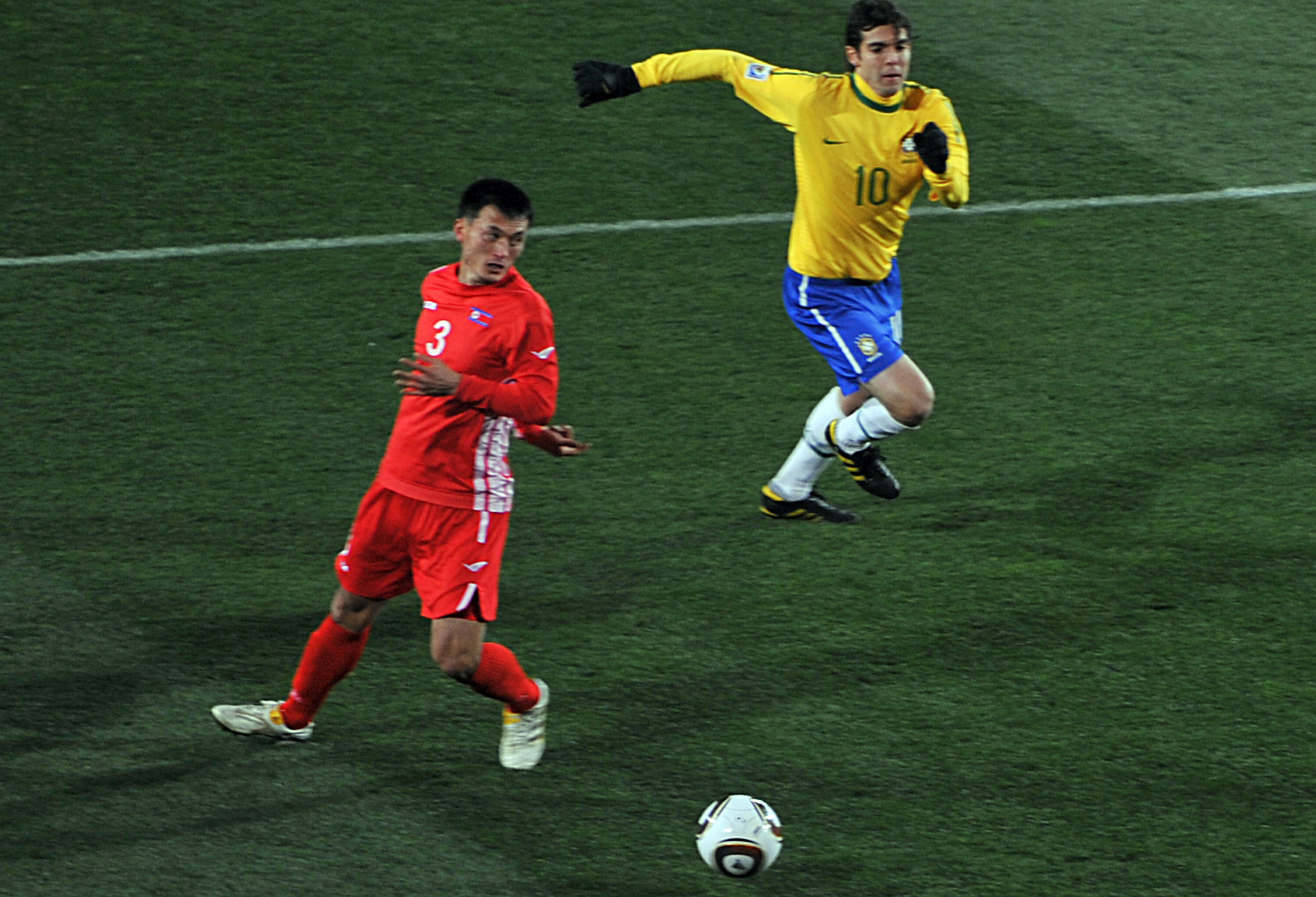 Seleção brasileira estreia na Copa do Mundo de 2010 contra a Coreia do Norte.